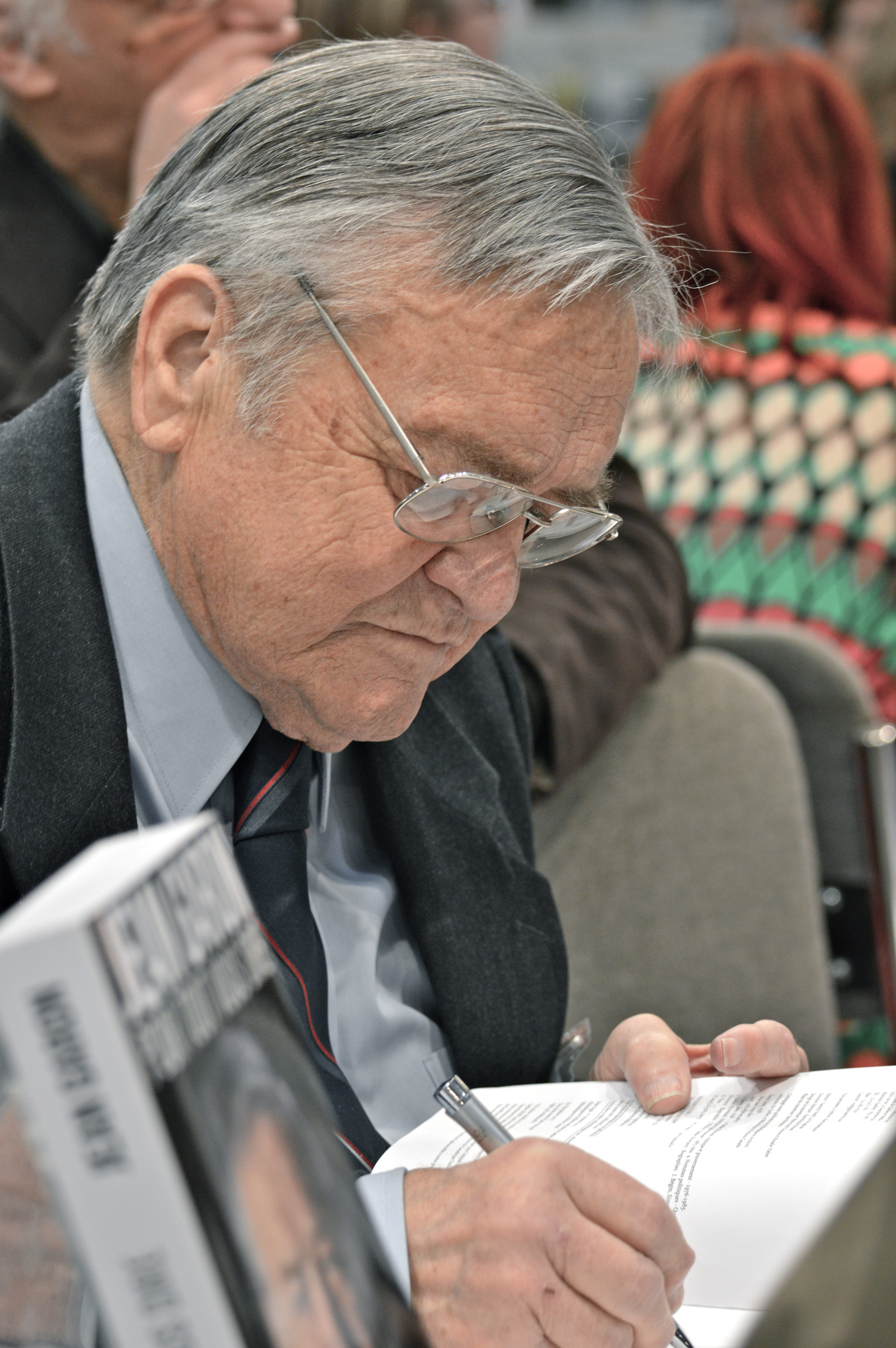 Jean Garon, en séance de dédicaces de son autobiographie Pour tout vous dire au Salon international du livre de Québec 2013